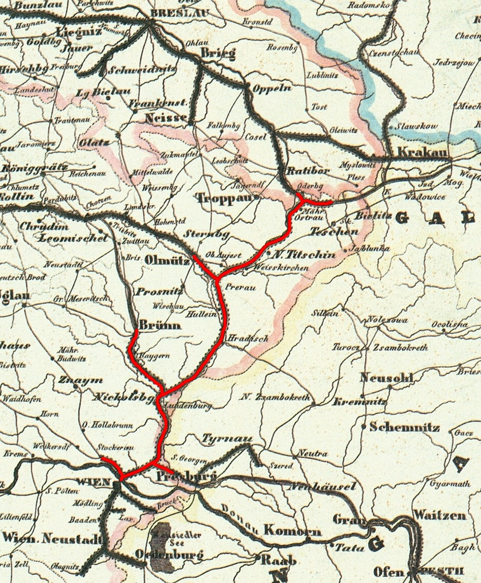 Bahnkarte von Deutschland und Nachbarländern 1849. Bearbeiteter Ausschnitt: Strecken der Kaiser Ferdinands-Nordbahn